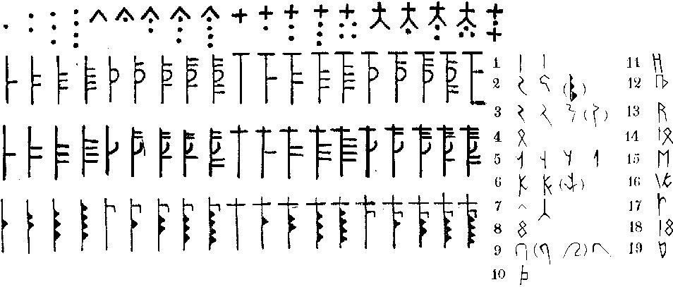 знаки на рунических календарях. сайт Арильда Хауге